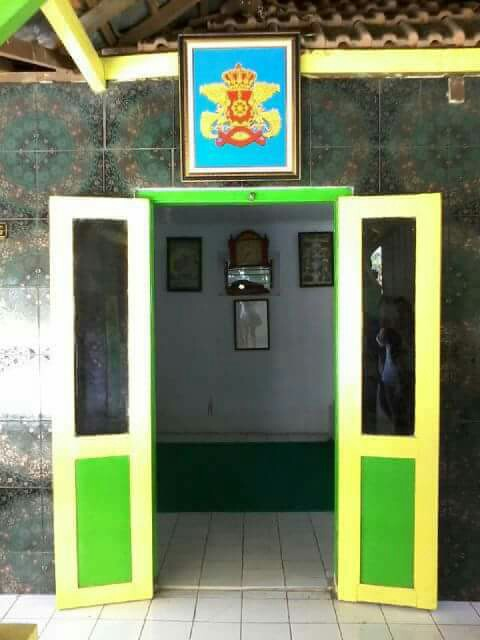 Makam Pangeran Cokrokusumo di Desa Kedungboto, Jatikalang, Krian, Sidoarjo. Masyarakat setempat menyebut makam tersebut dengan sebutan makam “Mbah Demang”. Di atas pintu terdapat Lambang Kesultanan Bangkalan.